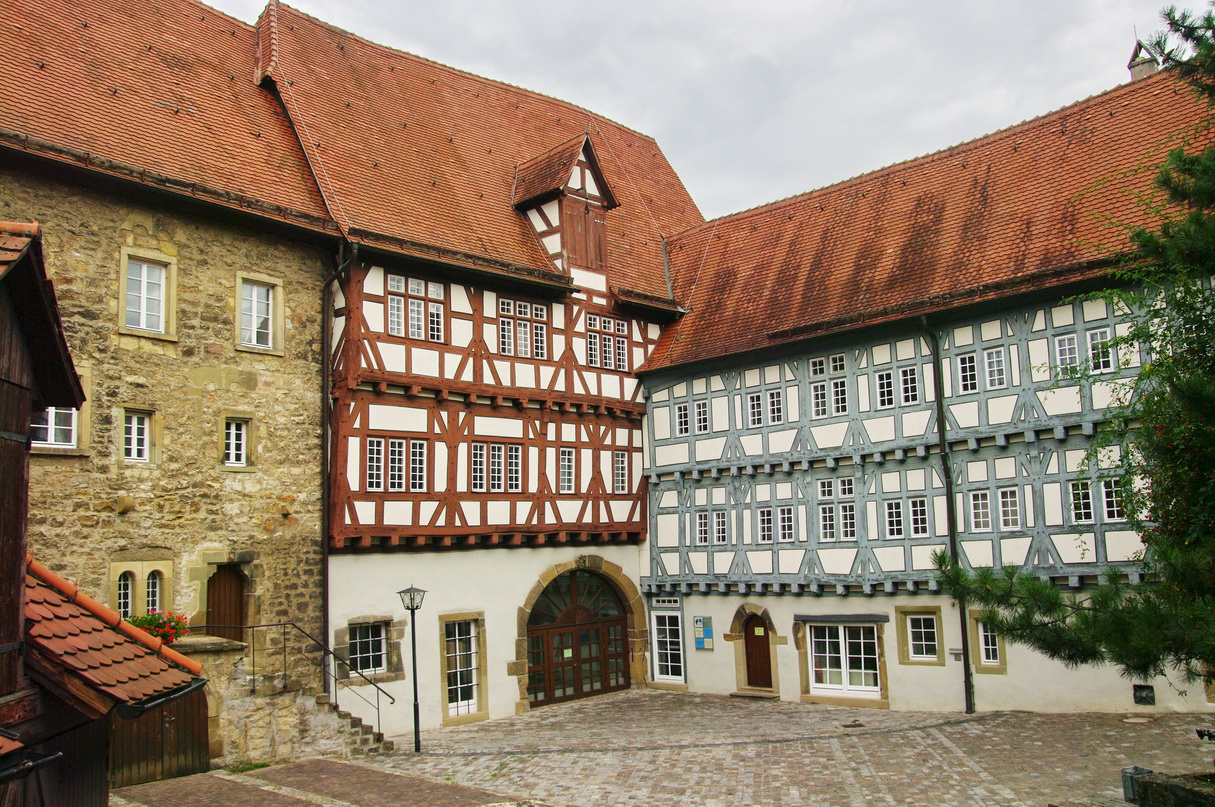 Spitalhof